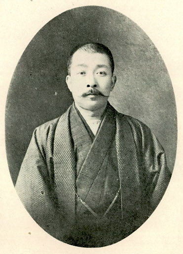 Bân-lâm-gú: Lîm Lia̍t-tông 林烈堂